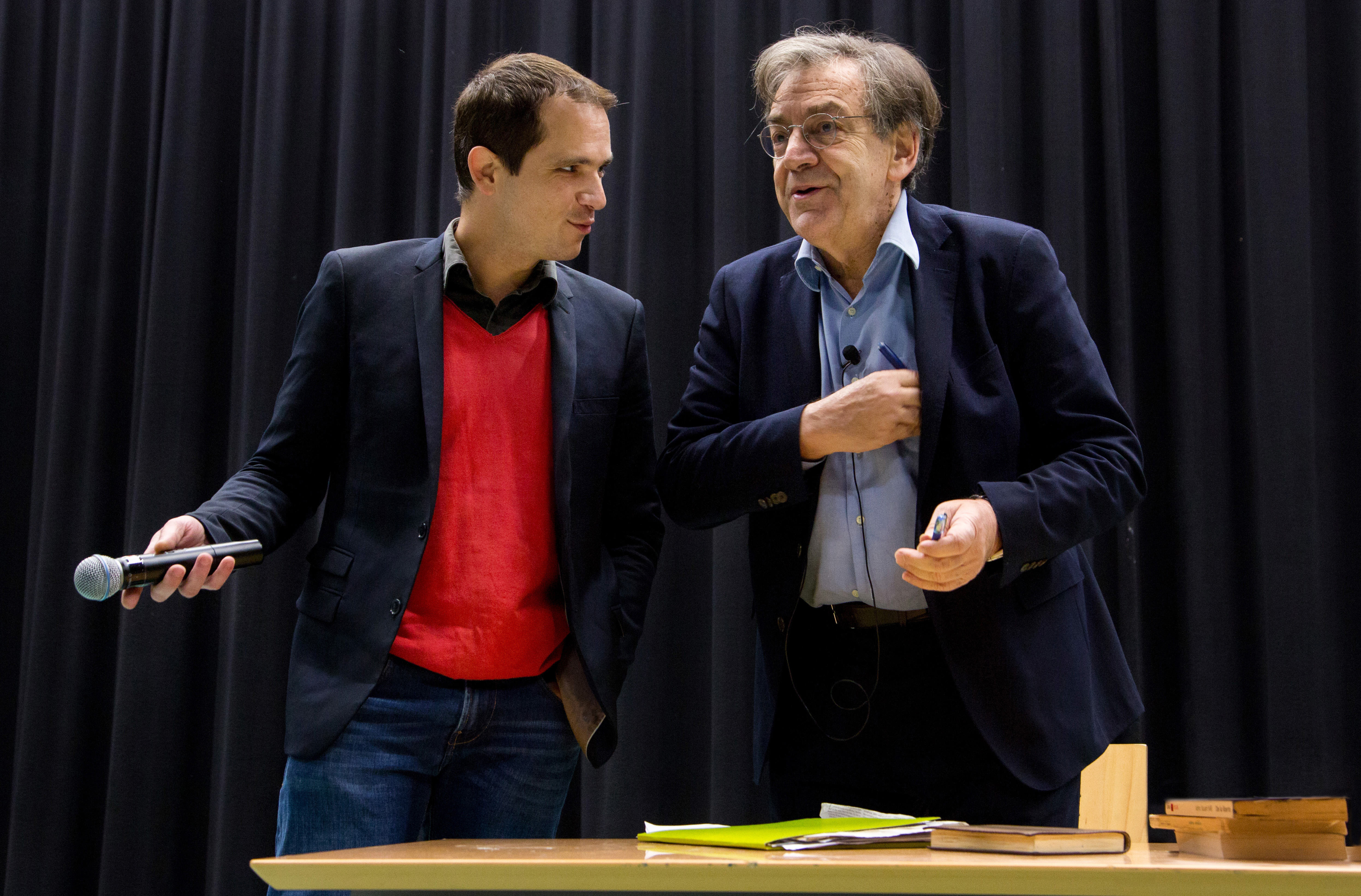 Cours de philosophie pour les élèves avec Alain Finkielkraut, invité par le professeur Michaël Foessel.